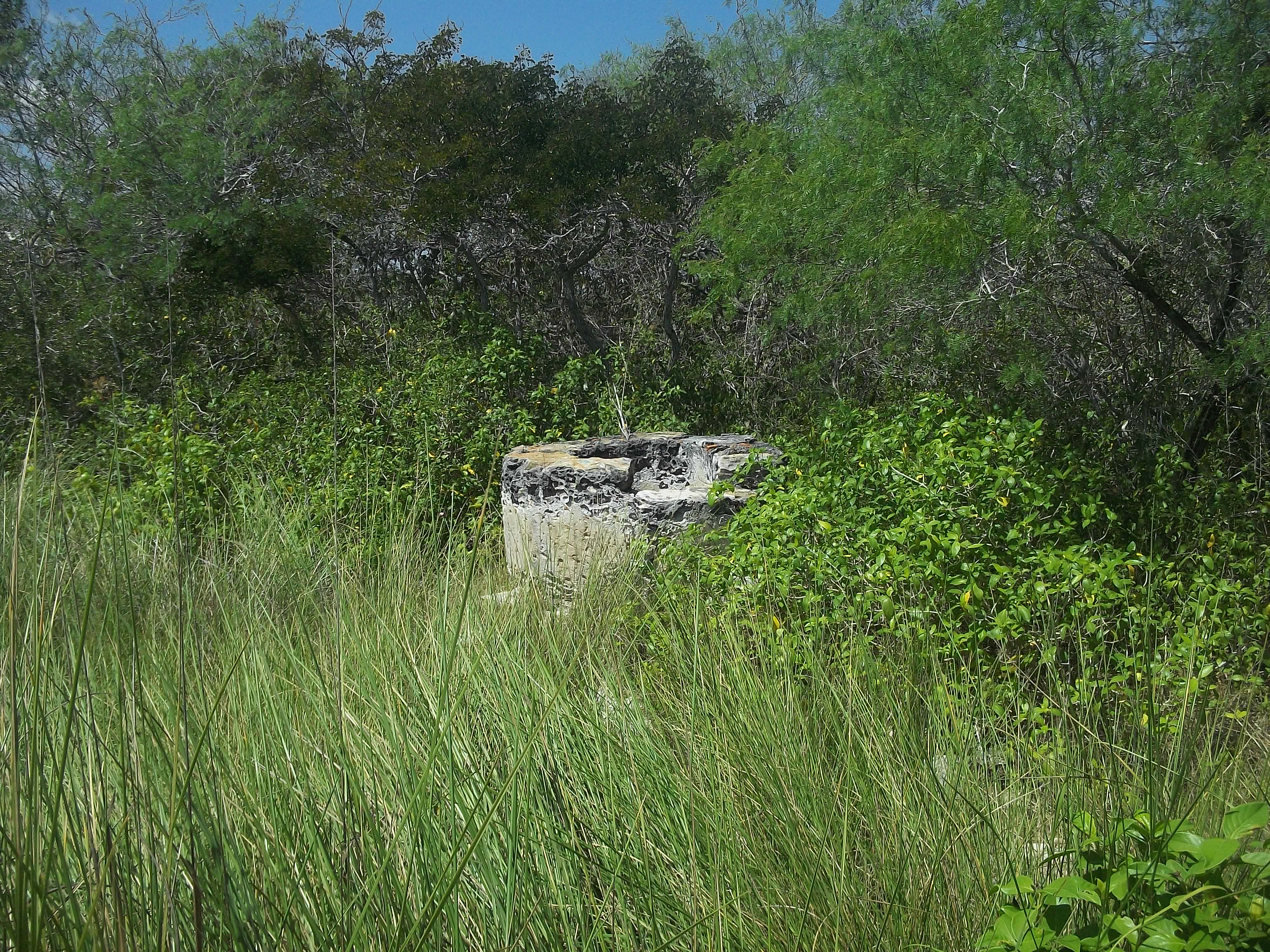 Vestigios de Santa Elena (municipio de Progreso), Yucatán.